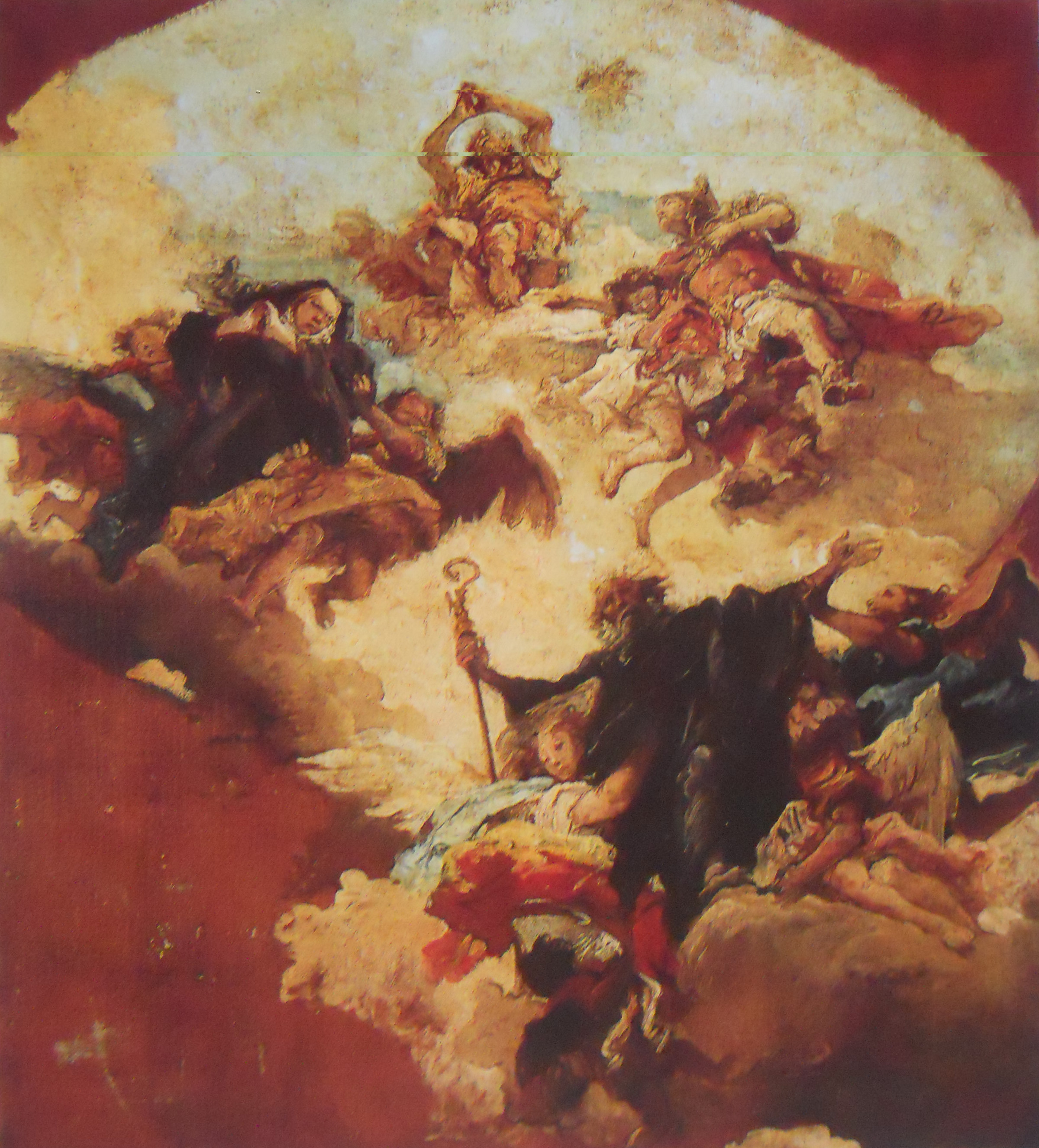 (modello)